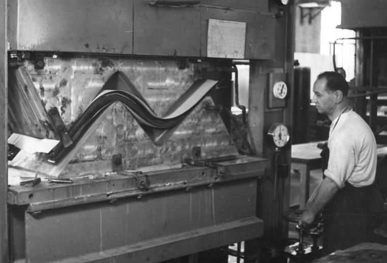 Hellerau, Möbelfabrik, Stuhlpresse Illus Junge 13.12.1951 Deutsche Werke in Hellerau bei Dresden - VEB Möbelbau. Im Betrieb wurde ein neuer Stuhl entwickelt, der aus kleinsten beleimten Fournieren gepresst wird. Die Stuhlpresse.